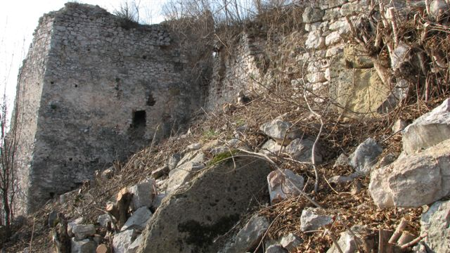 Szádvár - Szögliget - Hungary - Europe